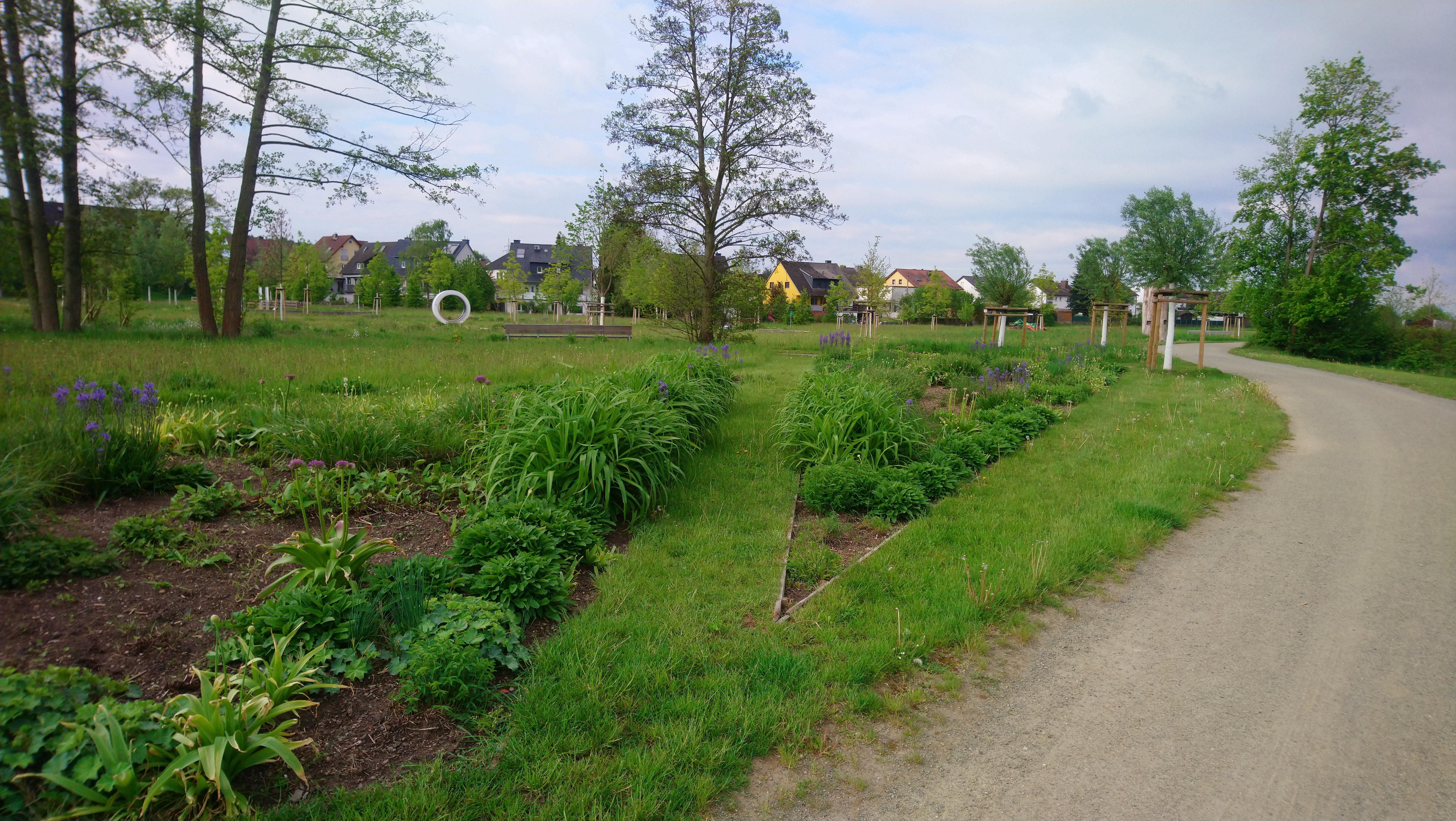 Im Energiepark in Alzenau